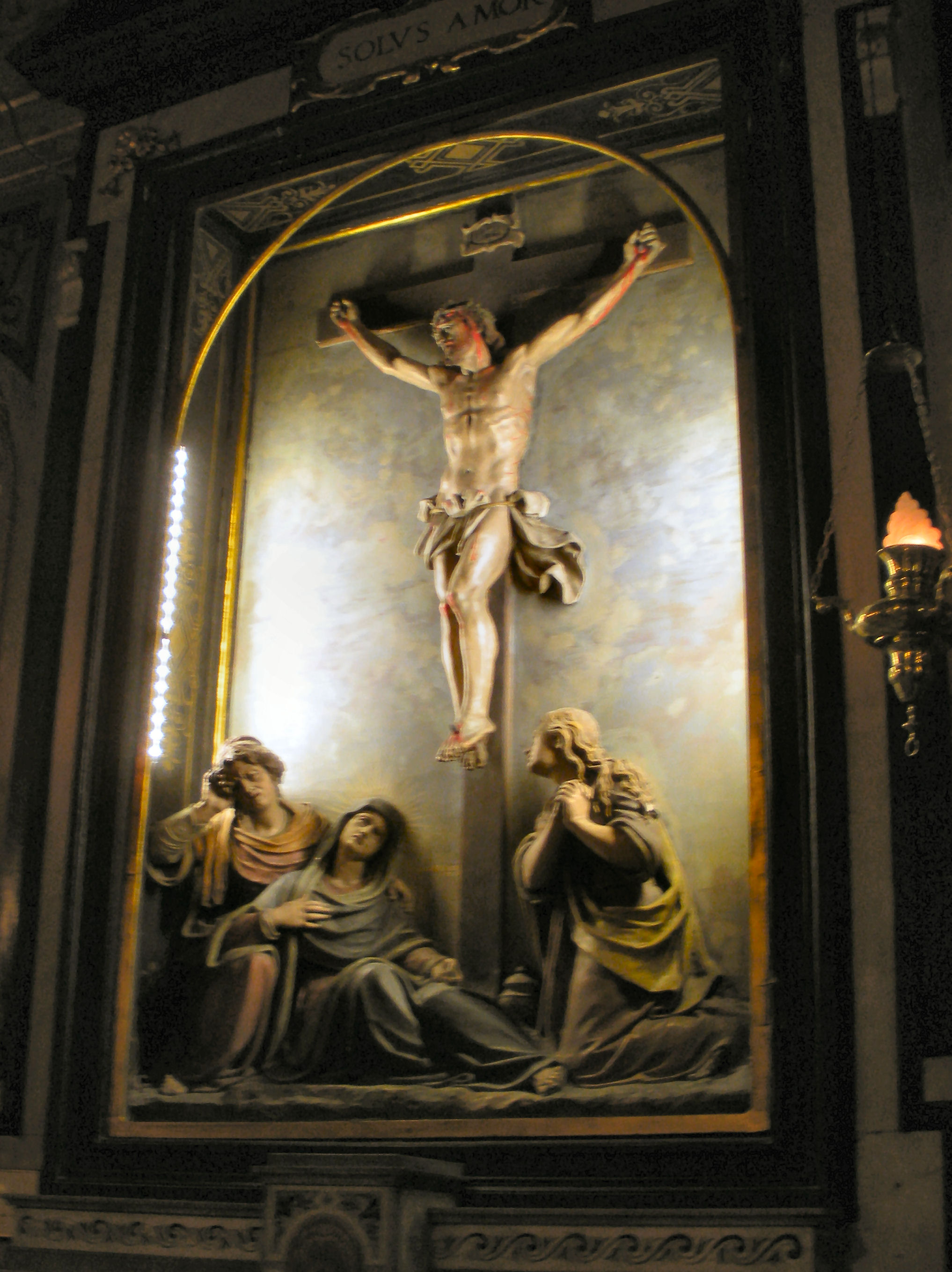 Antonio Brilla, Crocifissione, Chiesa di S. Francesco d'Albaro (Genova) Foto propria Gennaio 2010